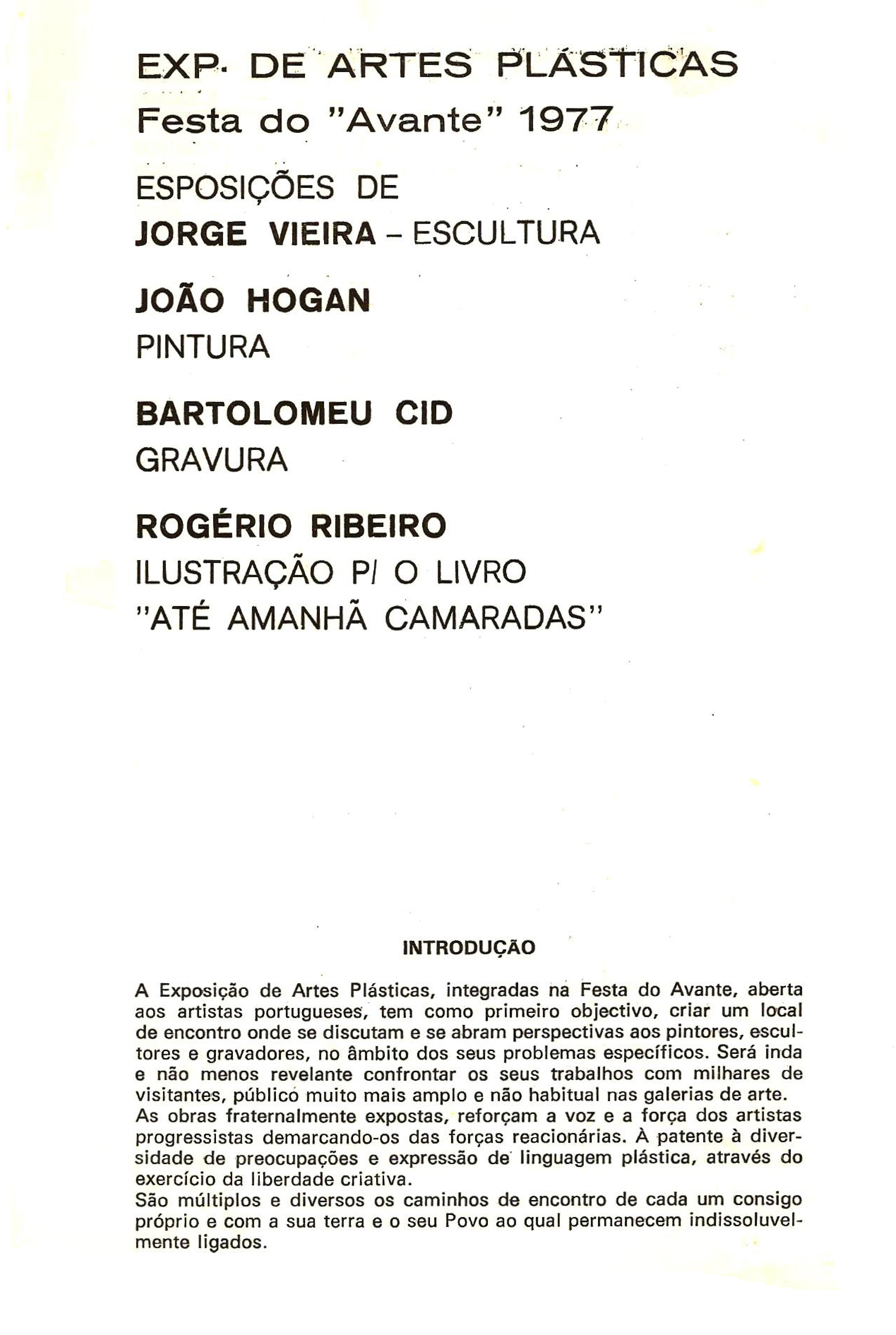 Exposiçao Artes Plásticas Festa do Avante, 1977